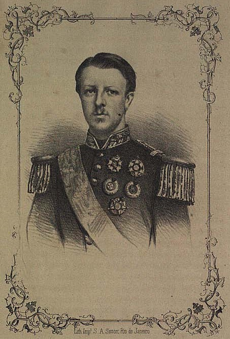 S. A. o Sr. Conde d'Eu.